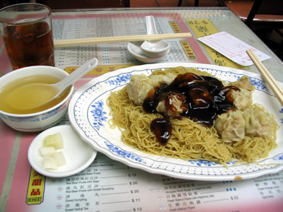 餛飩